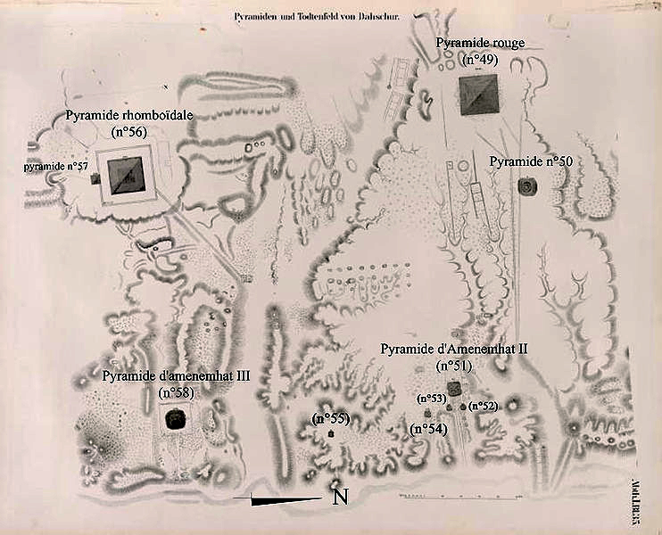 Carte des pyramides de Dahchour selon Lepsius